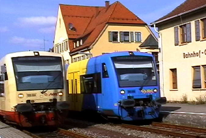 Regioshuttle der Hohenzollernbahn in beiden Farbgebungen im Bahnhof Balingen